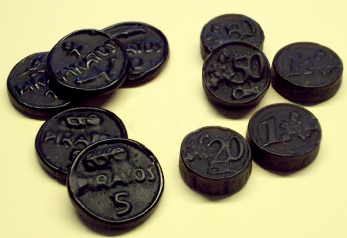 Lakritztaler (Erwachsenlakritz), Hartlakritz (links; Super-Piratos von Haribo), Weichlakritz (rechts; Schwarzgeld von Hollands Best) mit Euro-Referenzmünze